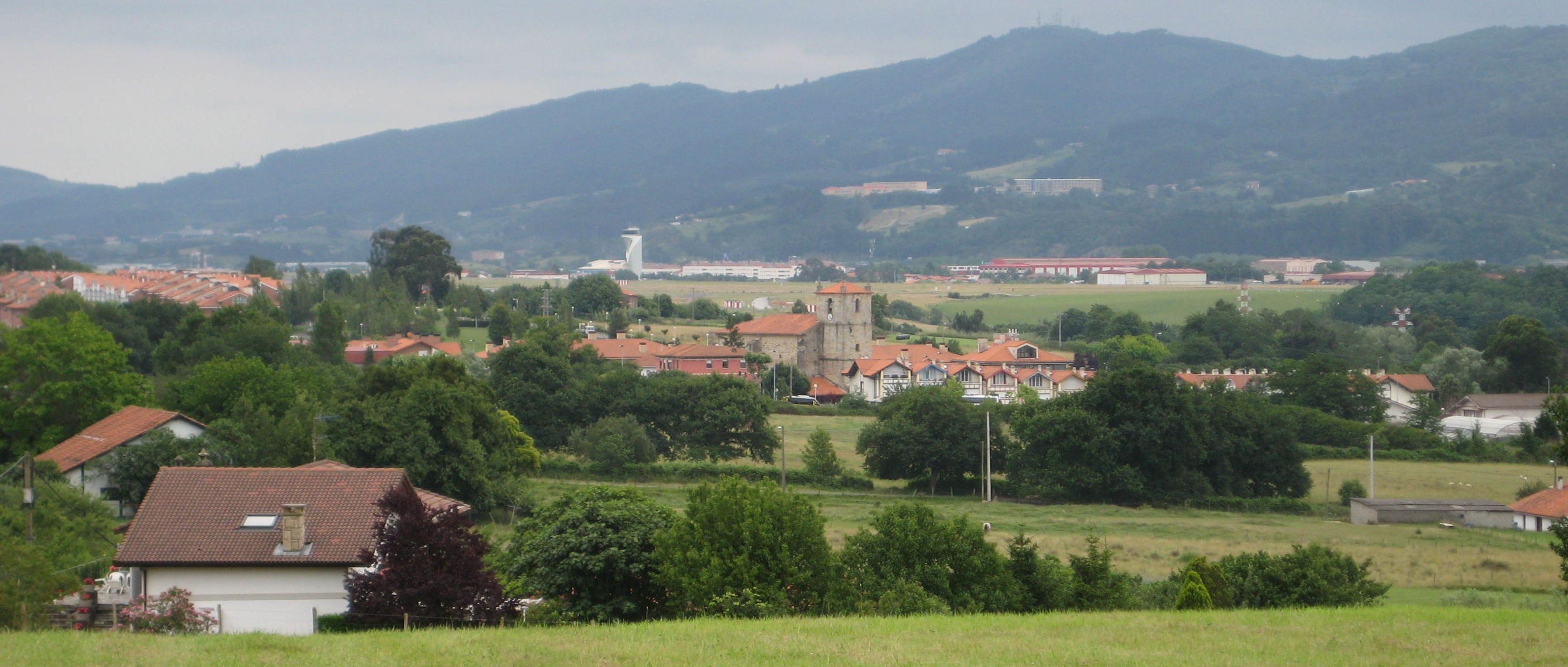 Barrio de Zabaloetxe y torre de control del aeropuerto de Bilbao en Loiu, Vizcaya.